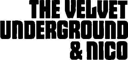 Logo del álbum The Velvet Underground & Nico